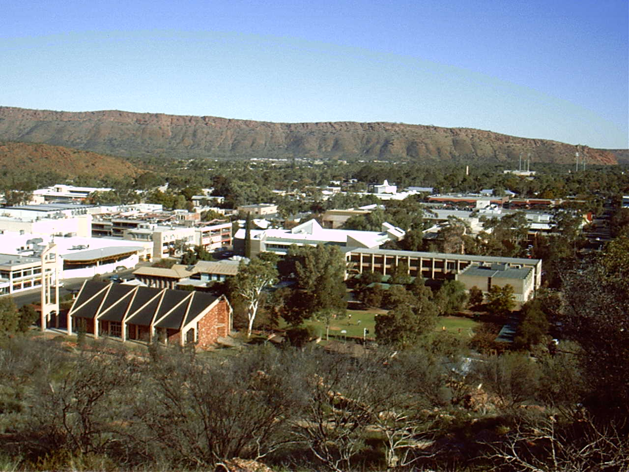 POL_0007